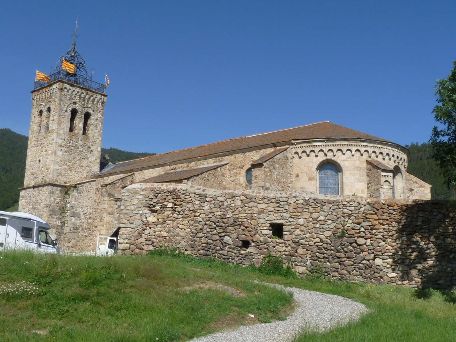 Eglise des Angles (vue de la cour intérieur du Château), Pyrénées-Orientales, France